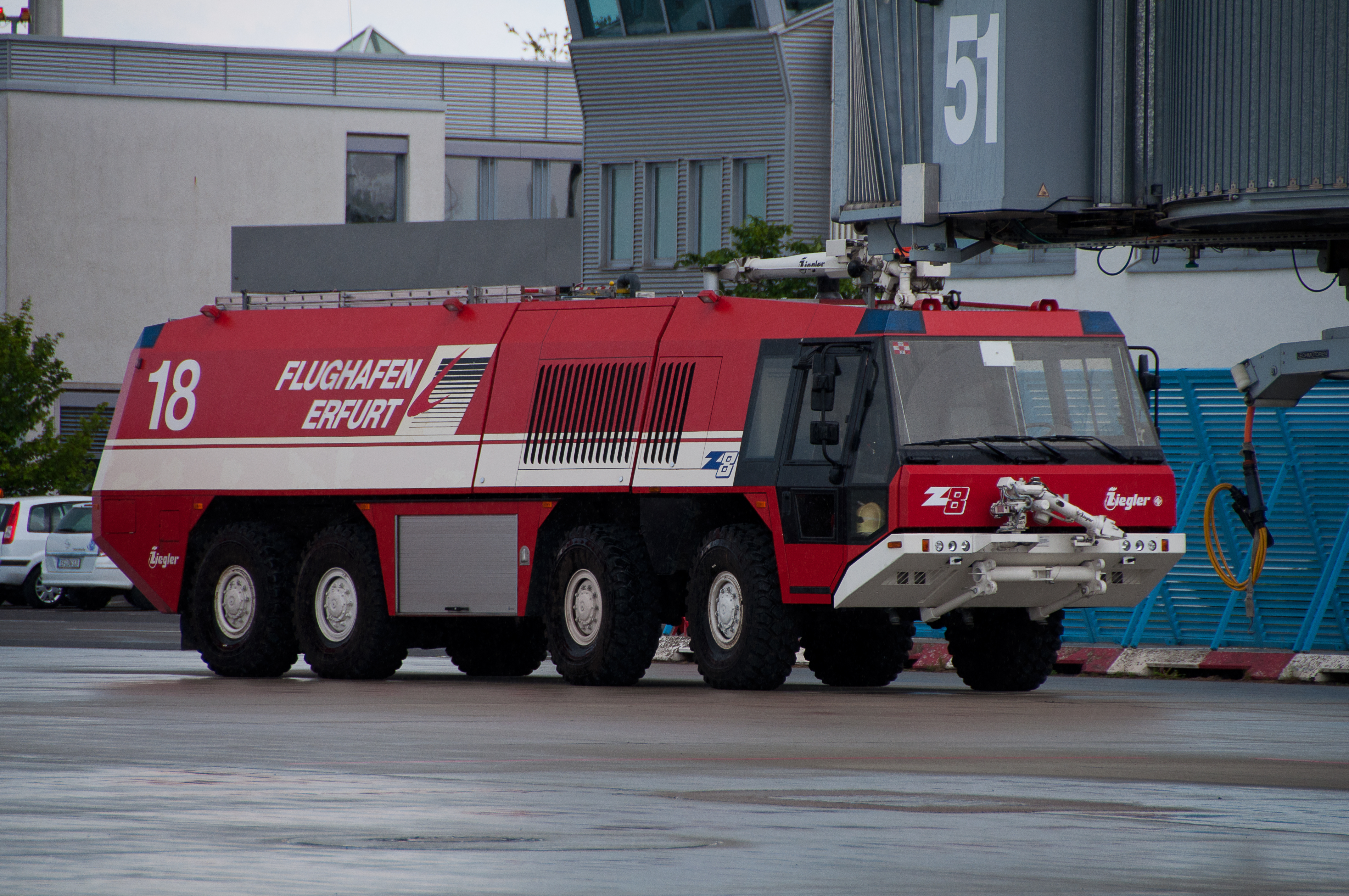 Ein Löschfahrzeug vom Flughafen Erfurt-Weimar